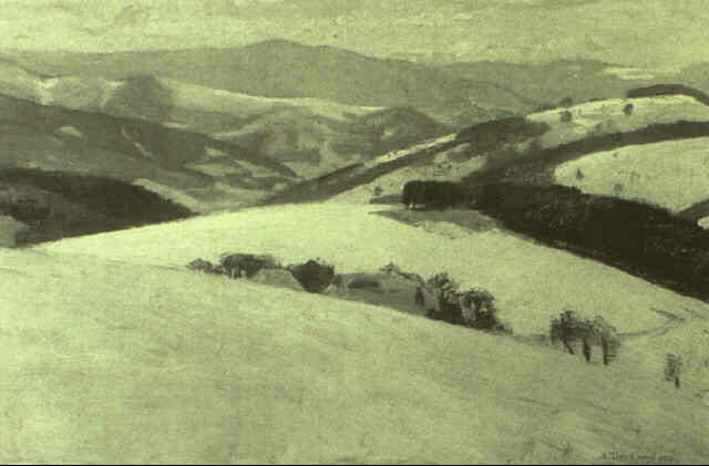 Bei St. Maergen